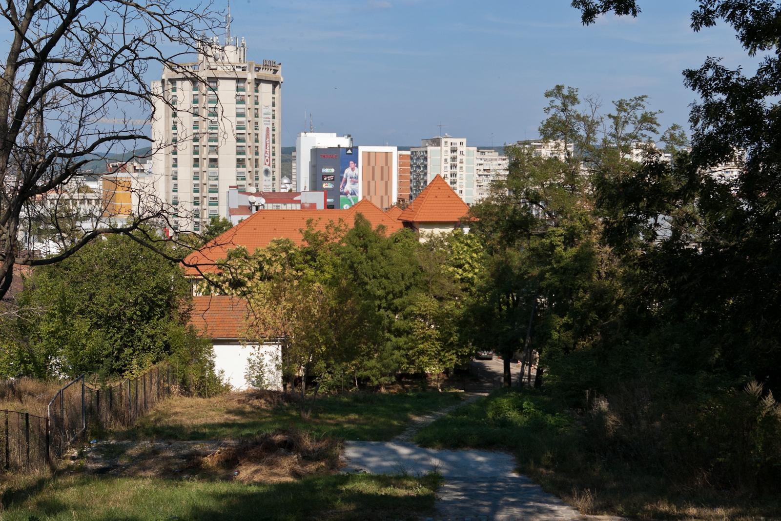 Fotografia prezinta ansamblul vechii Prefecturi vazut dinspre V (aleea Teilor).